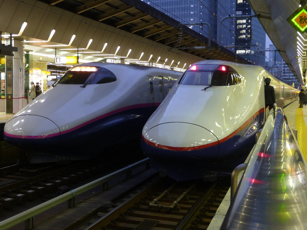 東京駅にて並ぶE2系1000番代（左・ピンク帯）と0番代（右・赤帯）。帯色の違いがわかる。